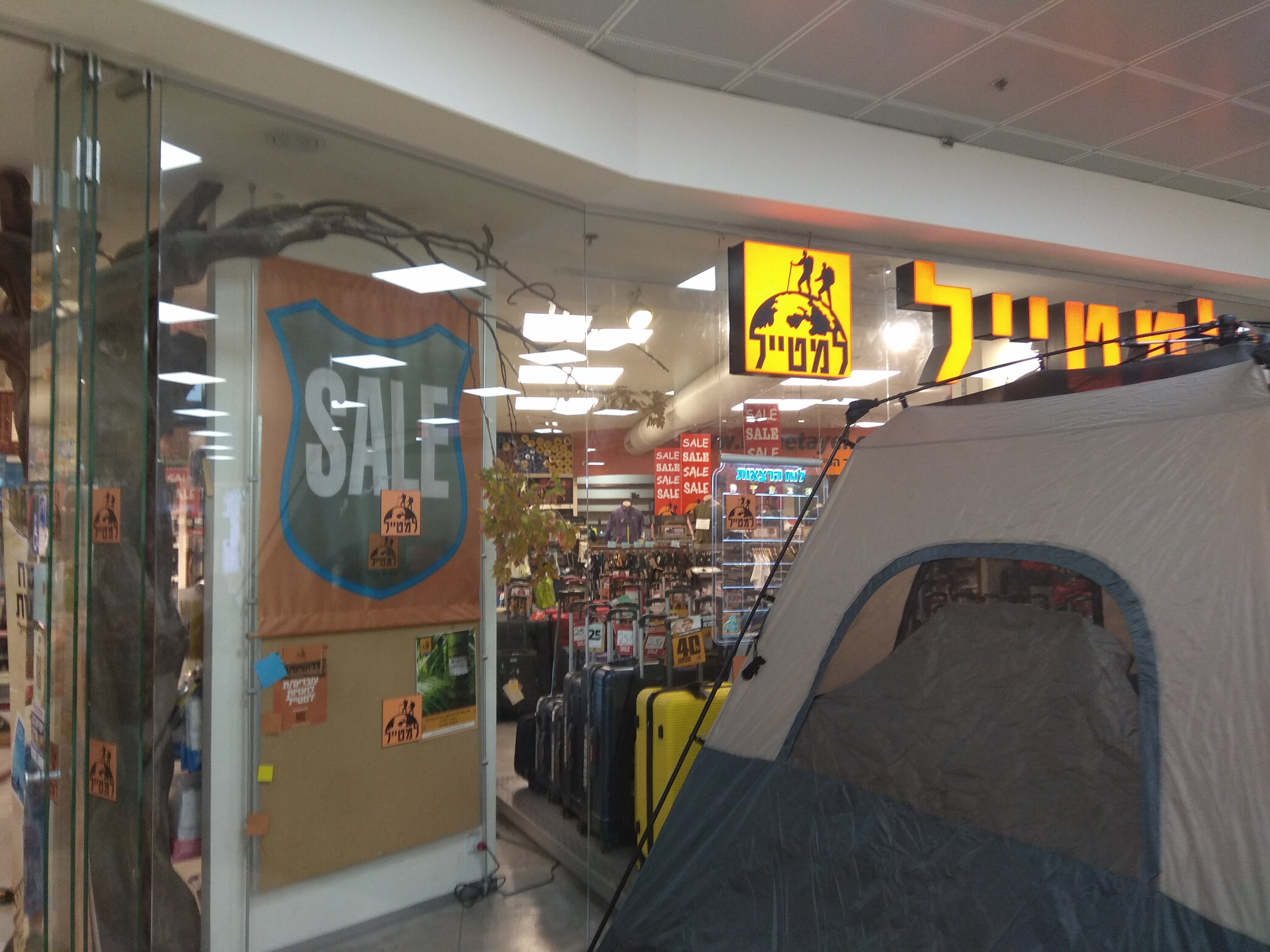 סניף למטייל